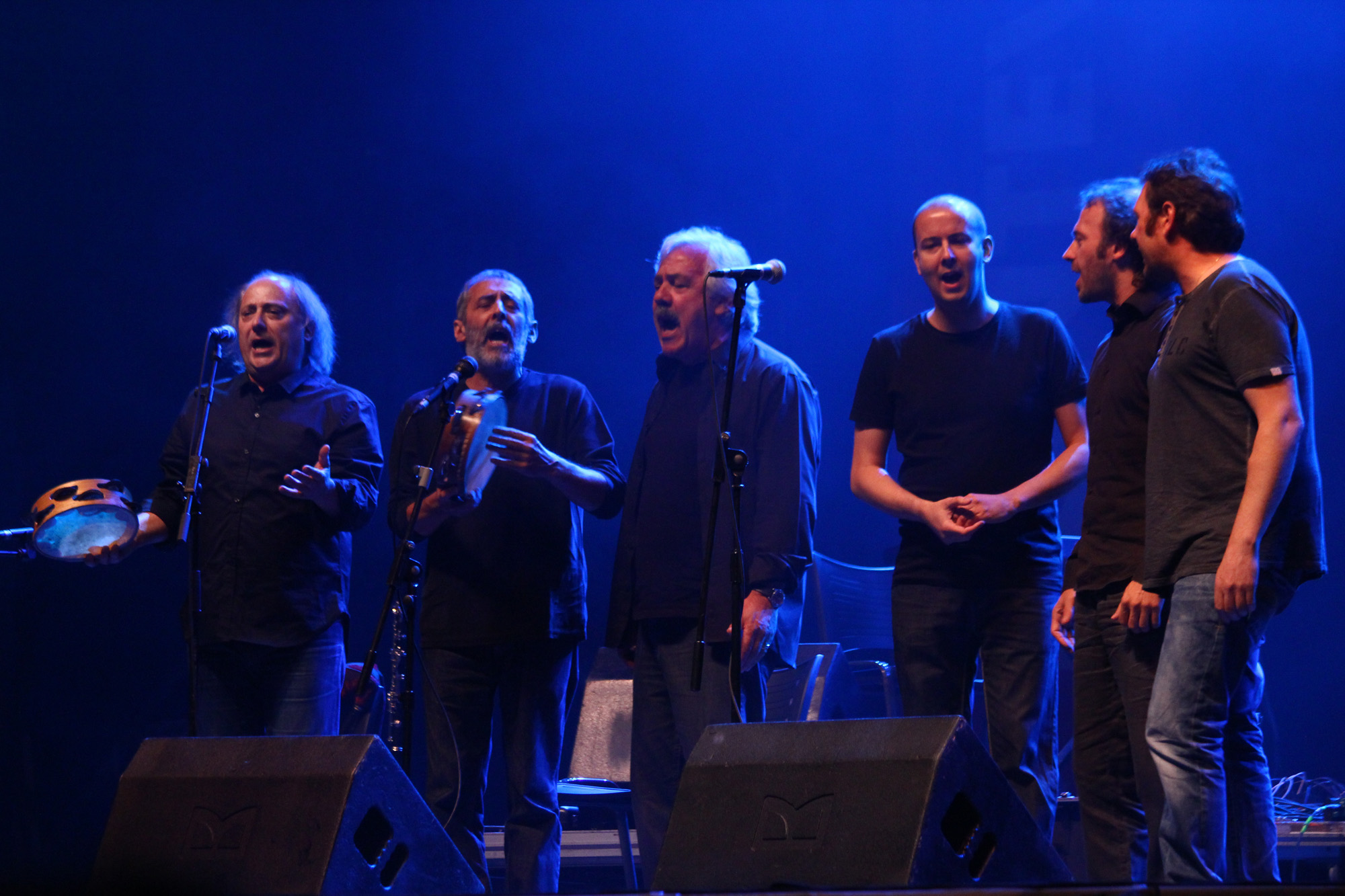 Concierto del grupo de música tradicional gallega Milladoiro en Pontevedra el 14 de agosto de 2014, durante las fiestas de la Virgen Peregrina, patrona de la ciudad. Milladoiro in Pontevedra Concert of the traditional Galician music group Milladoiro in Pontevedra on 14 August 2014, during the celebrations of the Pilgrim Virgin, patron of the city.